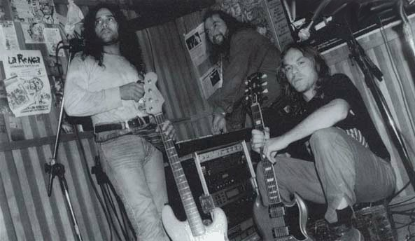 La Renga